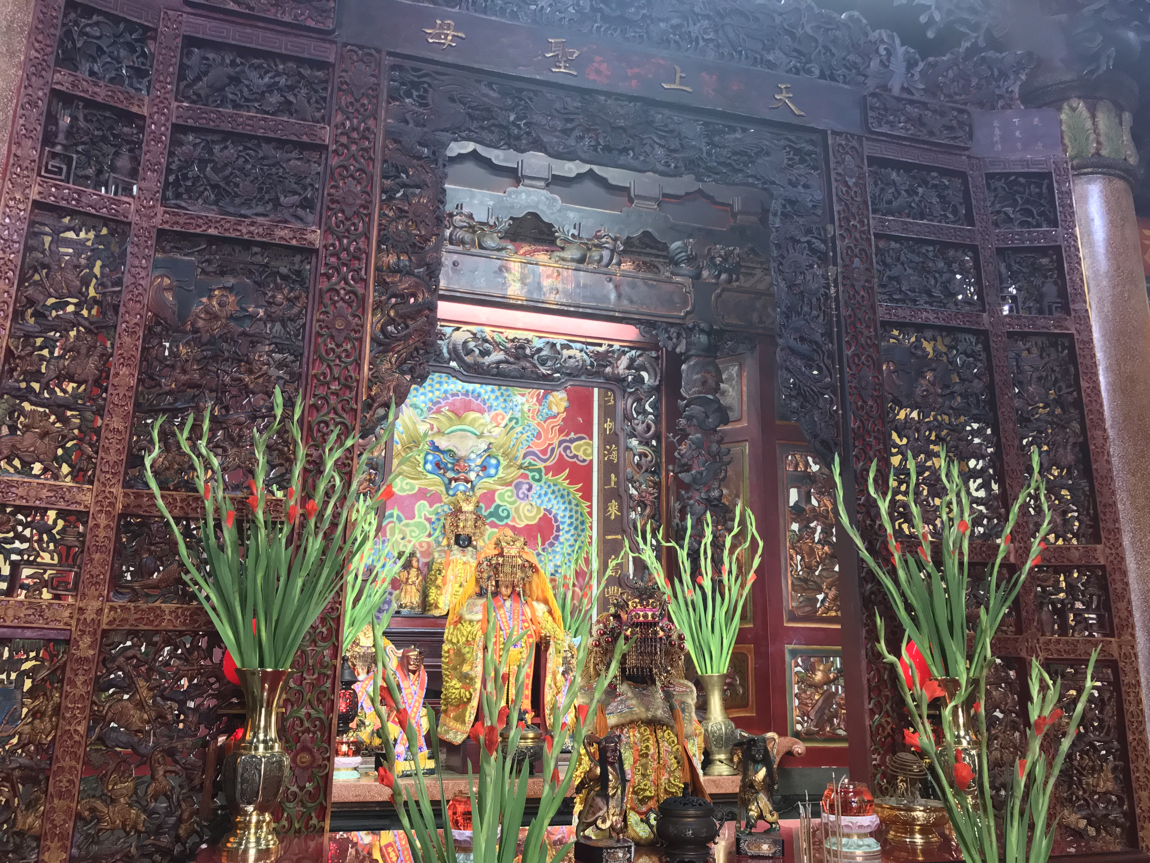 中文（台灣）: 暖暖安德宮採用三進廳來擺設媽祖神像。